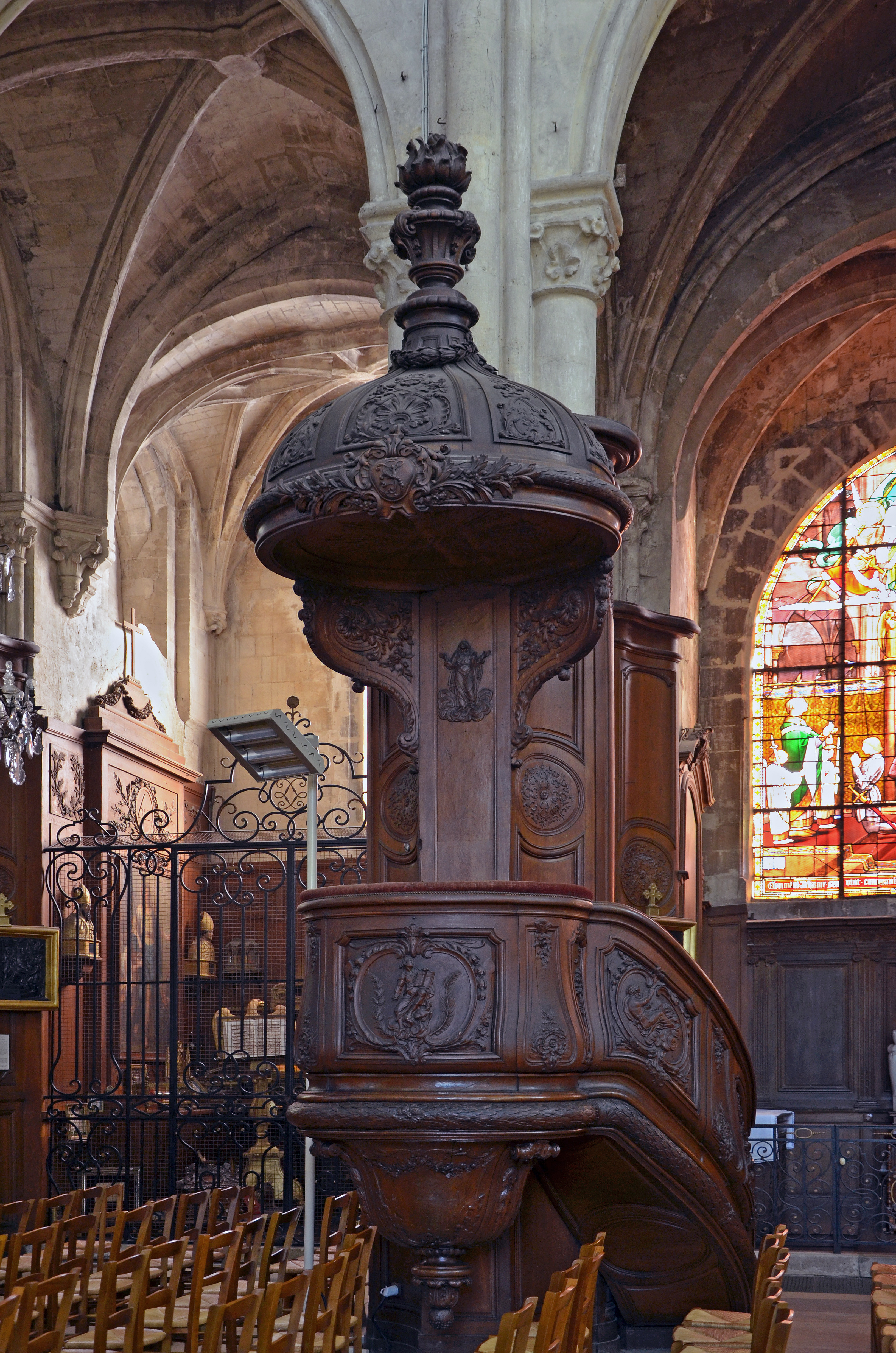 Église Saint-Jacques de Compiègne, Oise, Picardie, France